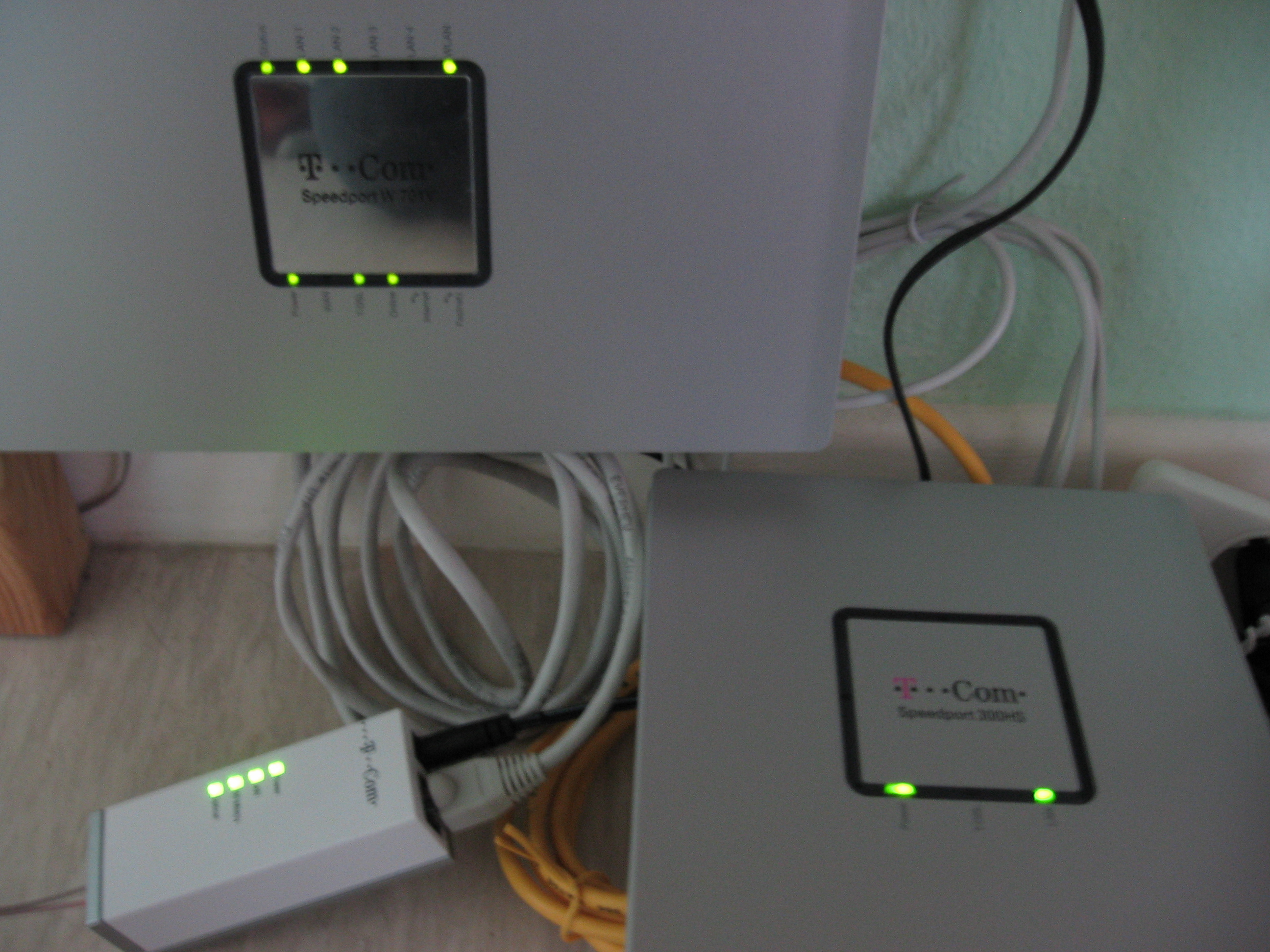 Speedport W 701V (oben links), Speedport 300HS (unten rechts) und Speedport OptoLAN Pack (unten links)